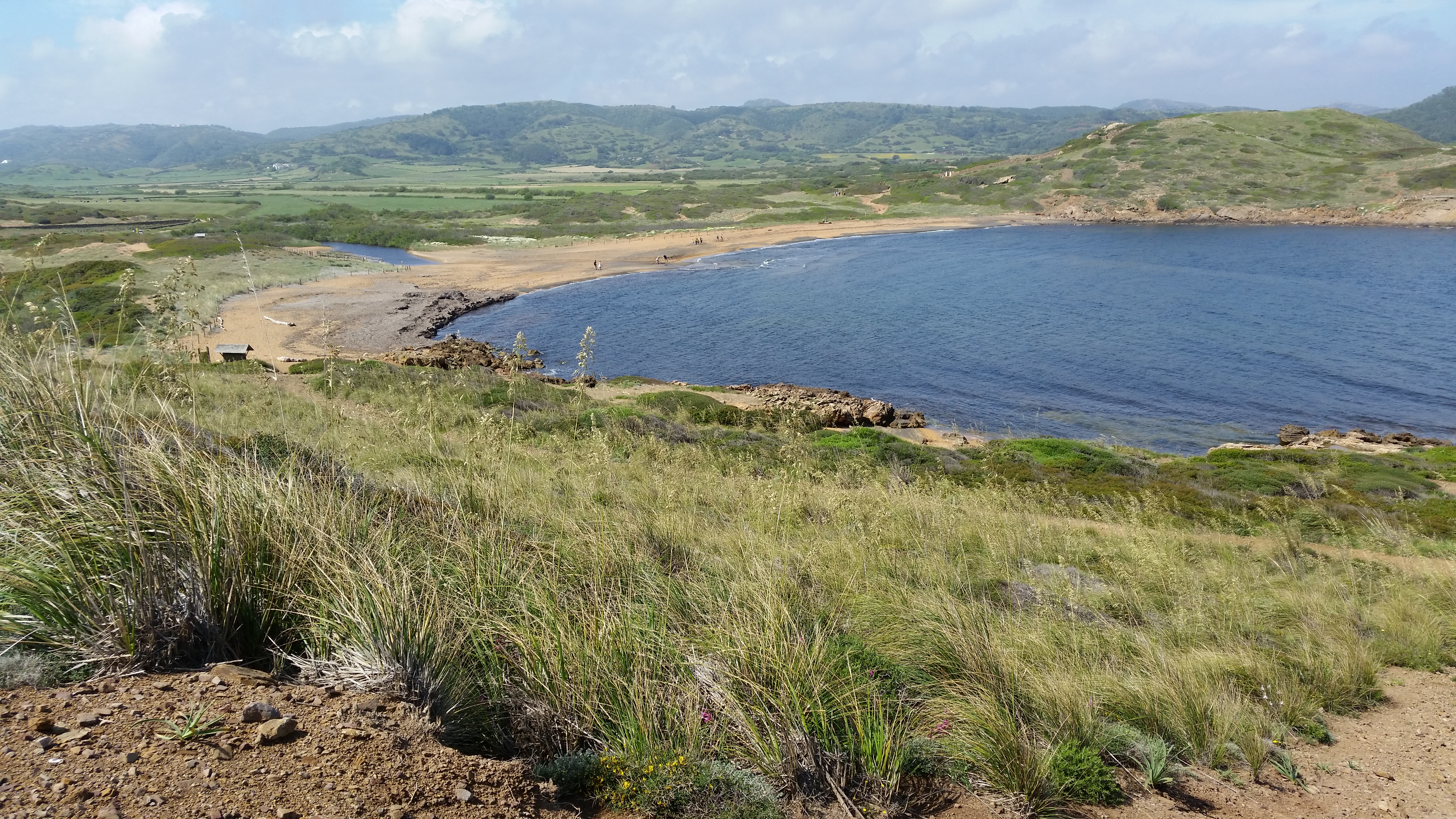 Playa de Binimel-là, 07740 Es Mercadal, Islas Baleares This is a photography of a Special Area of Conservation in Spain with the ID: ES0000231. Natura2000 entry, EEA entry